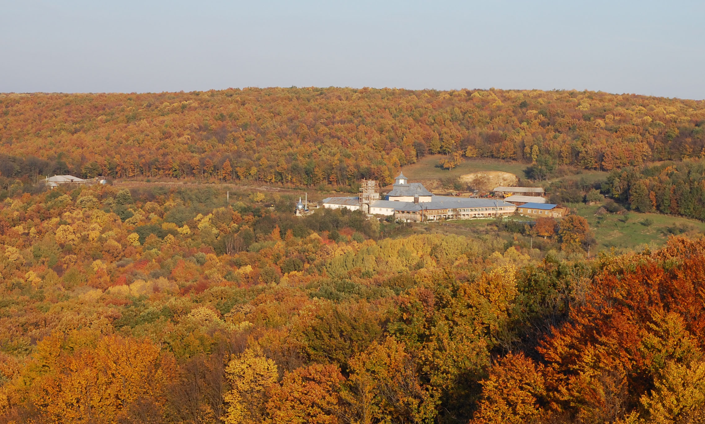 Vedere de ansamblu a Mănăstirii Grăjdeni. 31 octombrie 2009